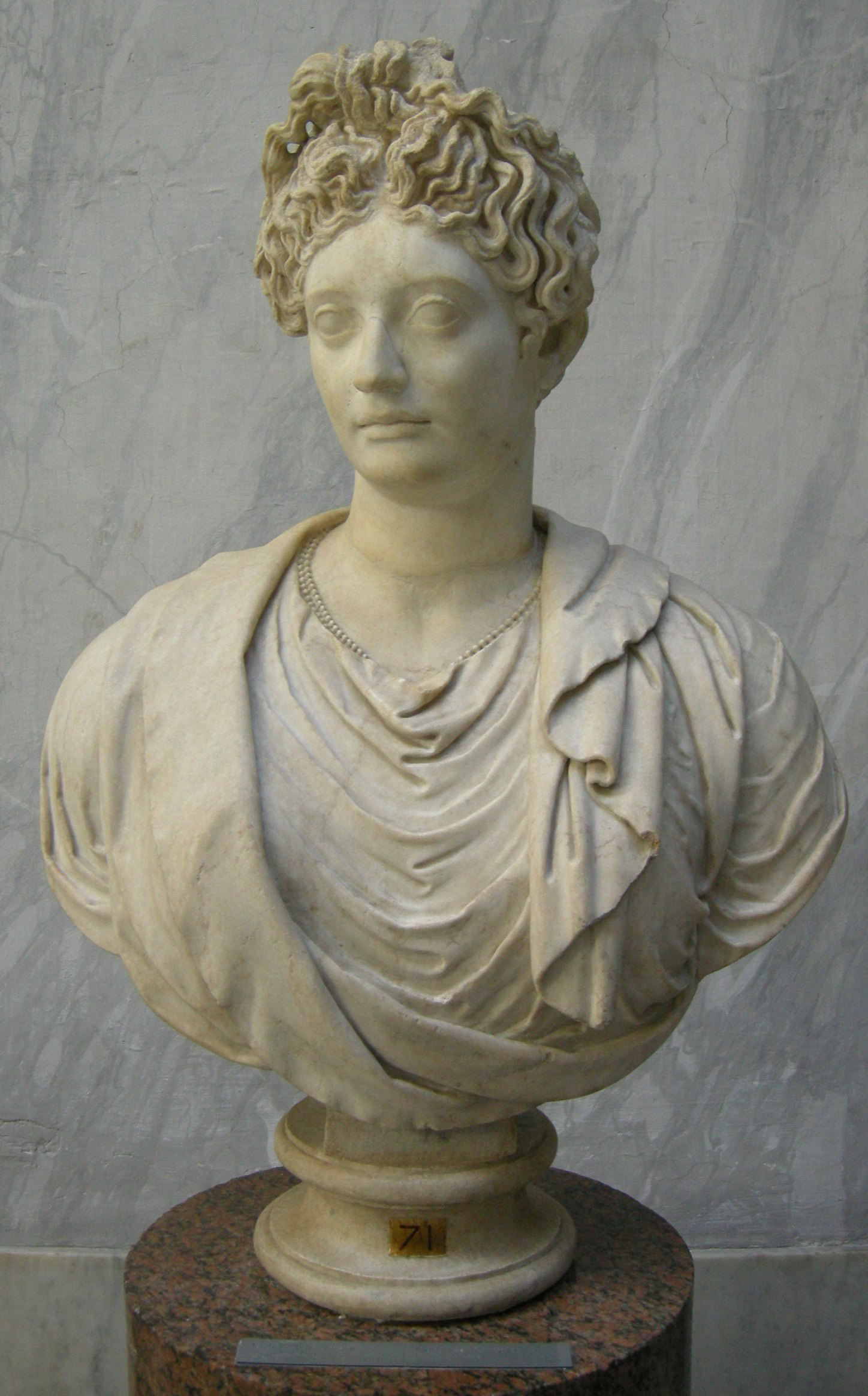 Busto, di restauro moderno, di Giulia, figlia dell'imperatore Tito. Musei Vaticani, Museo Chiaramonti - Braccio Nuovo; inv. 2269.